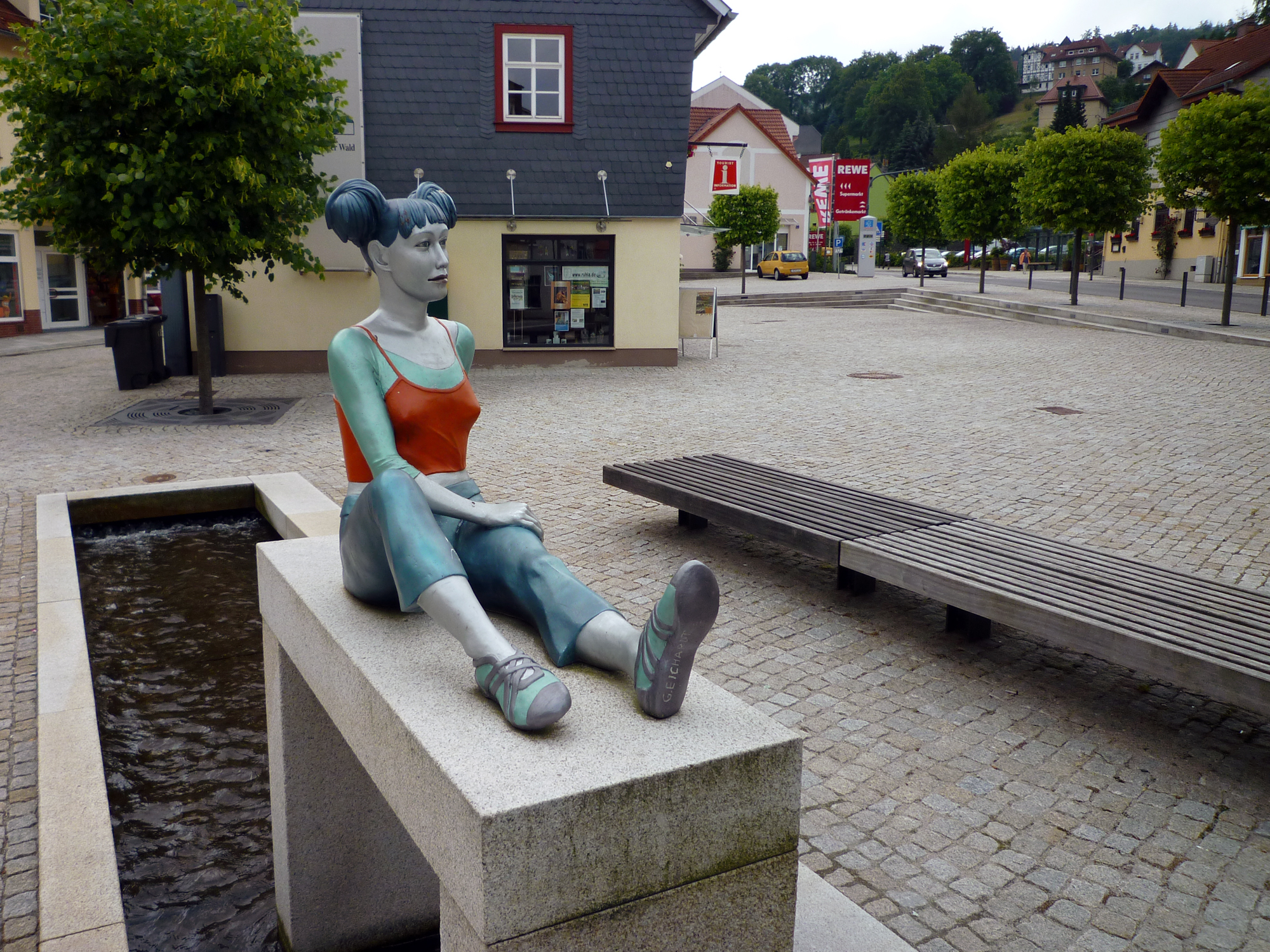 Teil des Marktplatz in Ruhla mit einer der beiden Figuren von Gisela Eichardt